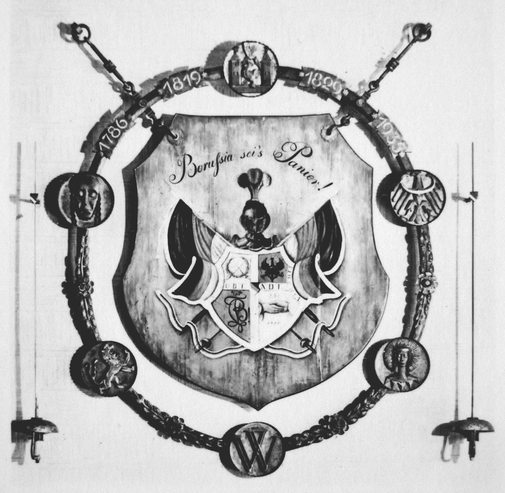 Holzwappen des Corps Borussia Breslau von 1860. Der schmiedeeiserne Rahmen ist von Lothar Neumann (1936), mit Datum der Suspension 1935)